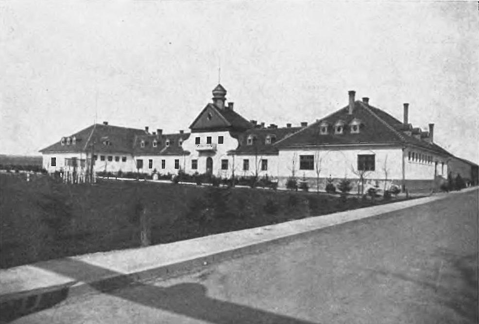 Zabudowania dowództwa 2 pułku lotniczego w Krakowie (przed 1929)